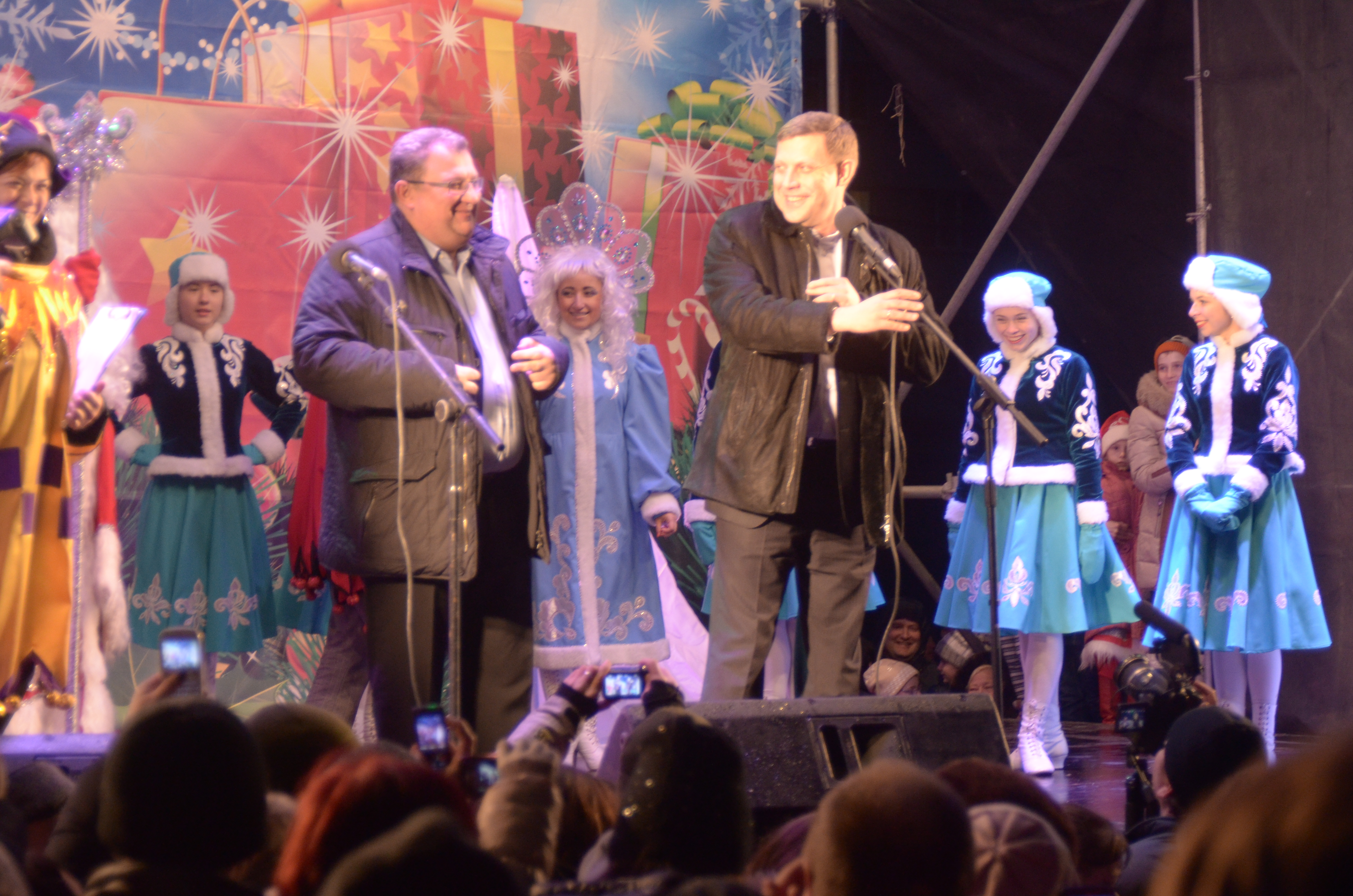 Открытие новогодней ёлки в Донецке